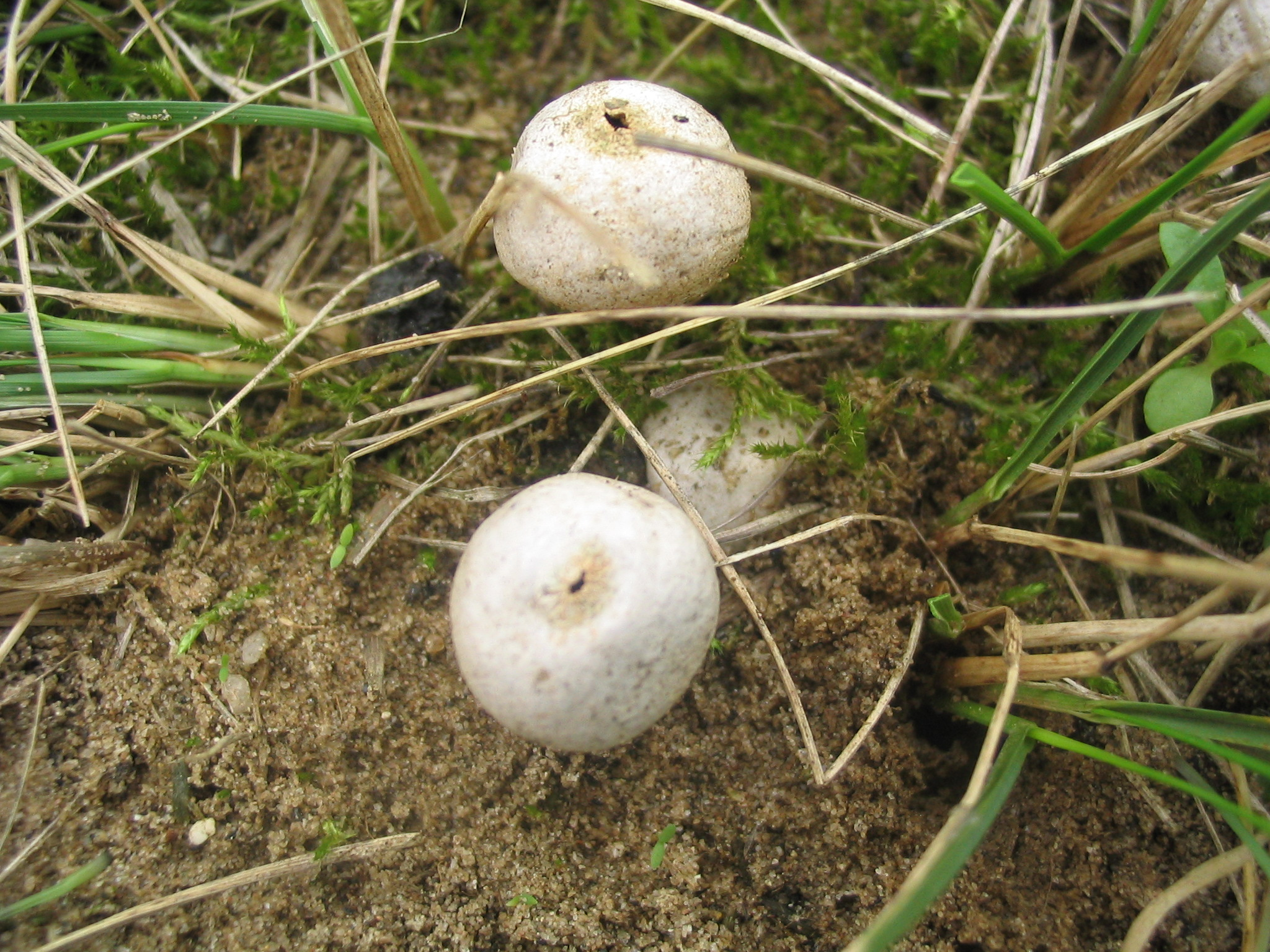 Gewimpeter Stielbovist (Tulostoma fimbriatum) aufgenommen am 29.09.2007 von Dr. Hagen Graebner